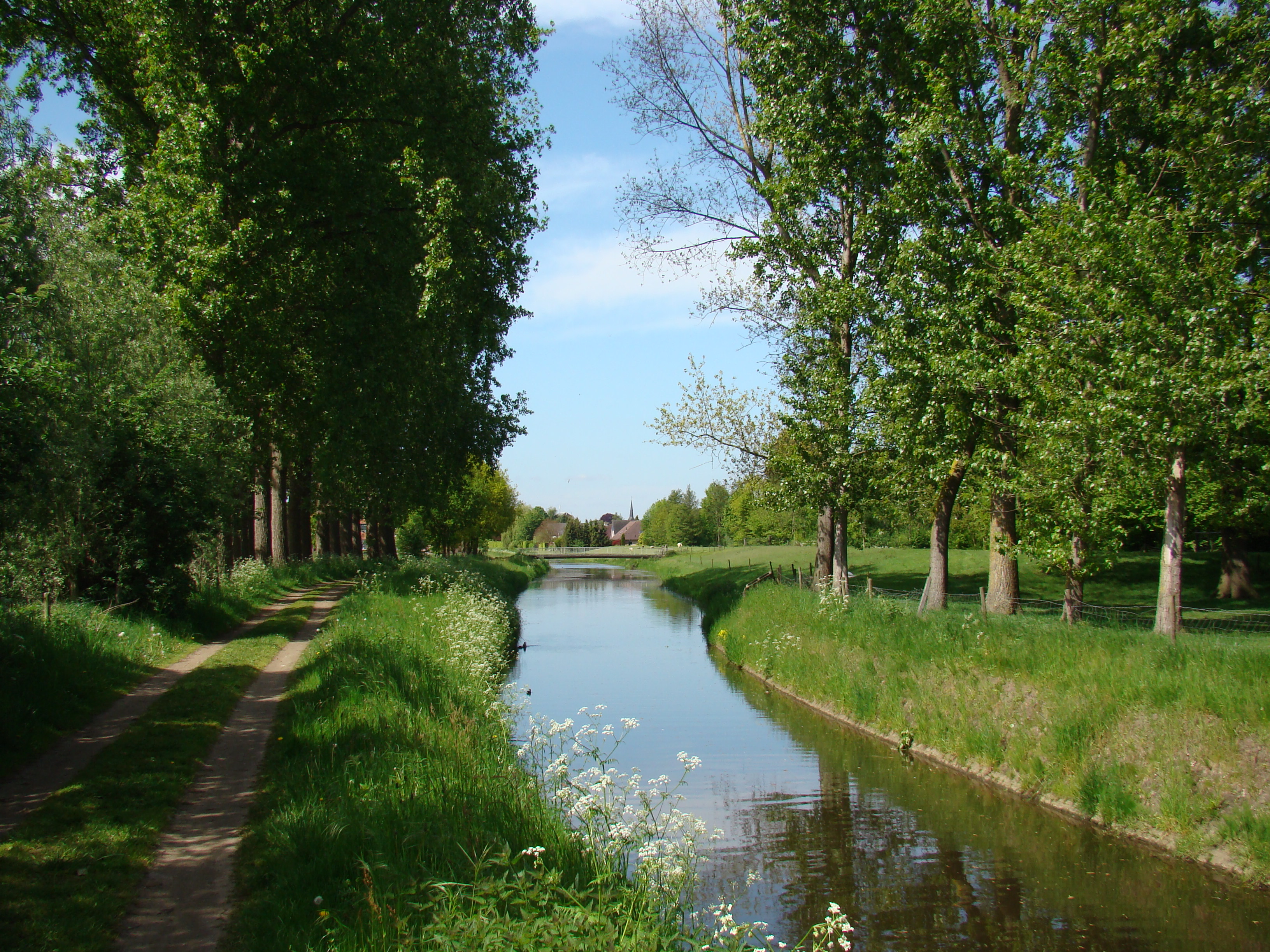 Karrenspoor zandweg Den Lesten Stuuver - Bredevoort, rechts de Slingebeek